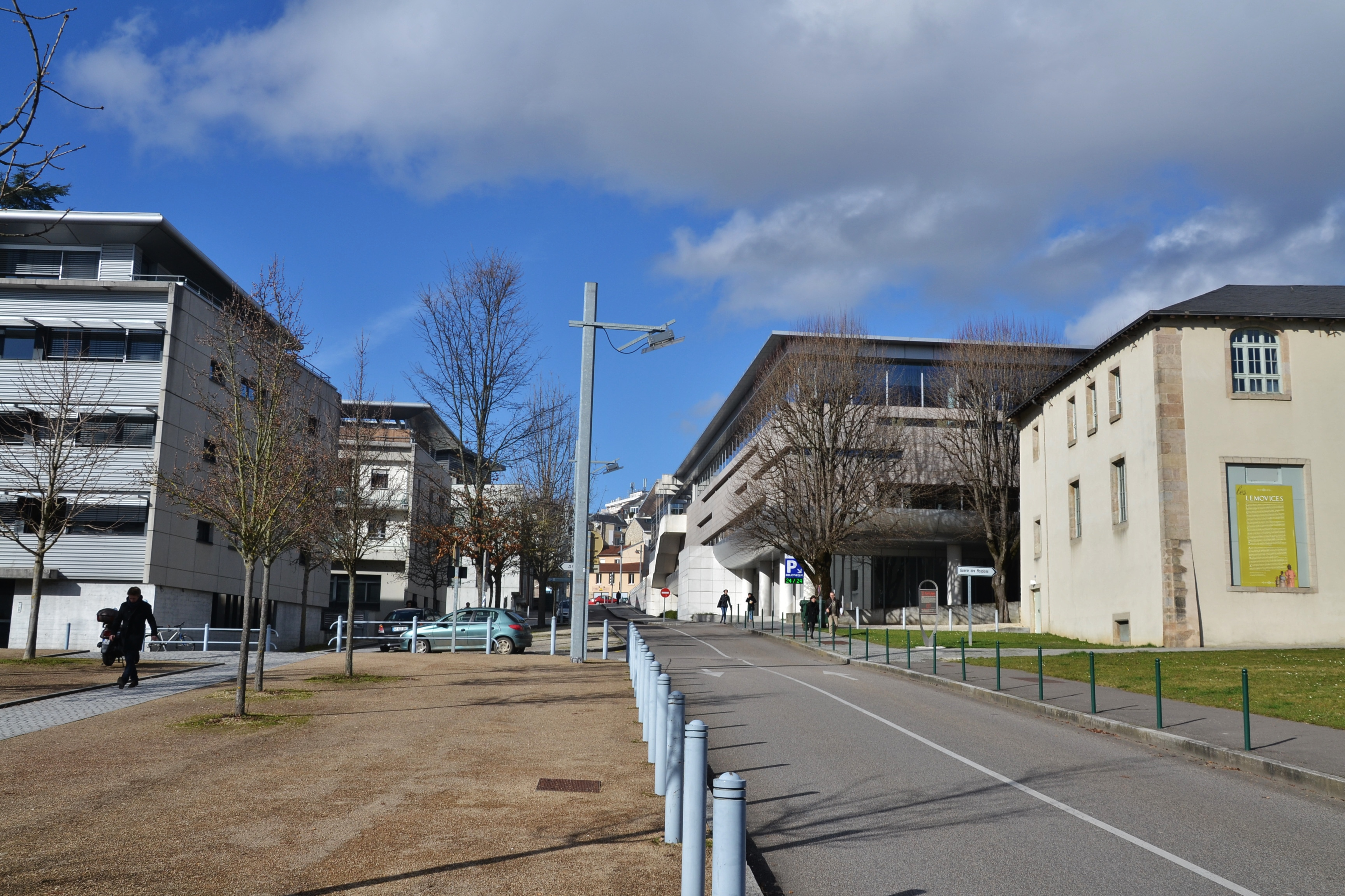 Rue François-Mitterrand, Limoges (Haute-Vienne, France).